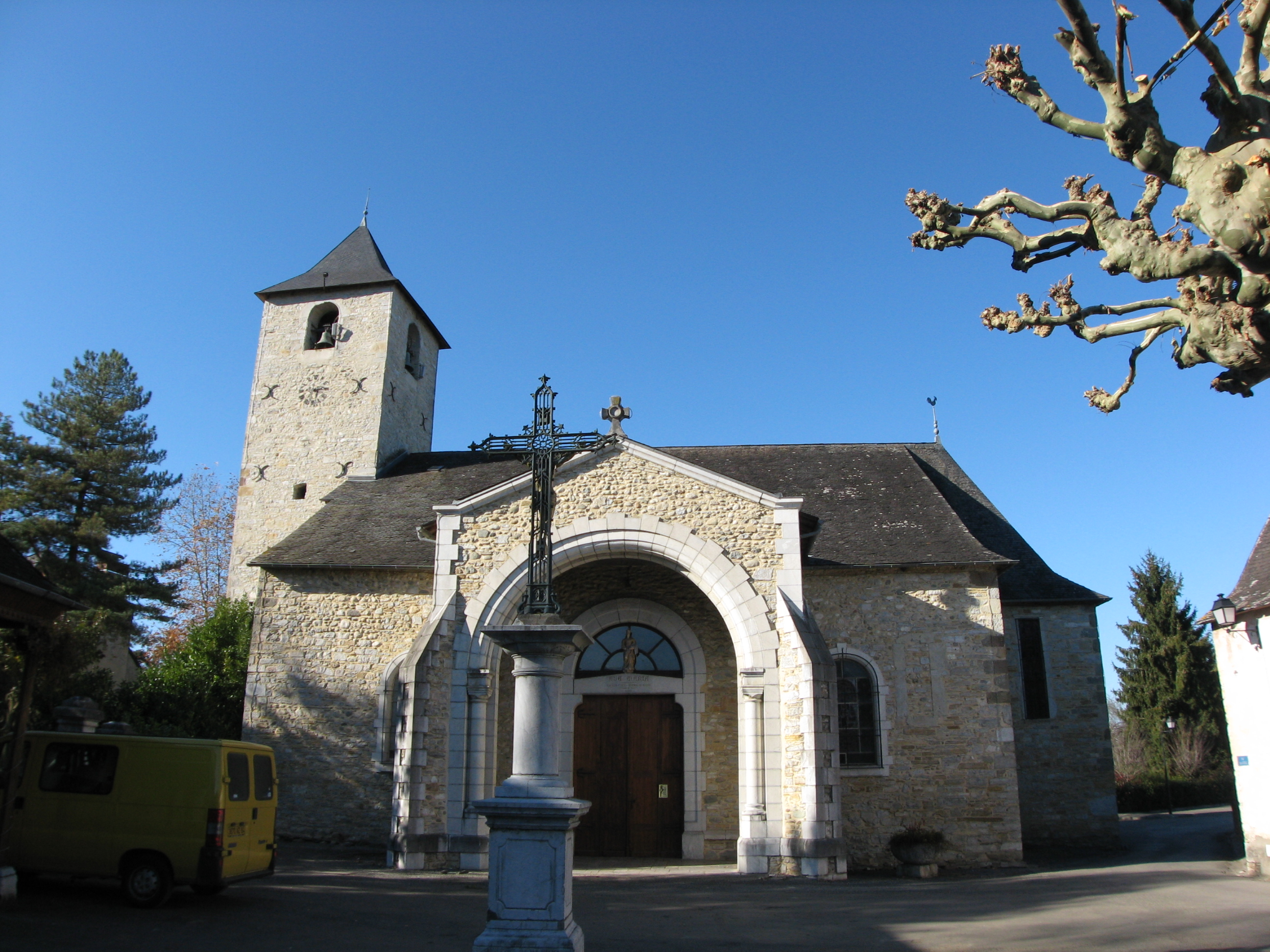 Eglise Saint Just d'Ogeu-les-Bains (Pyrénées-Atlantiques) (Pyrénées).